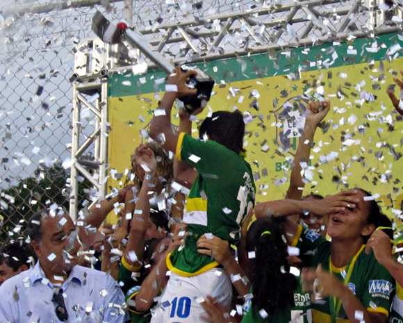 Kelly, capitã do Duque, levanta a taça de campeã da Copa do Brasil de Futebol Feminina 2010